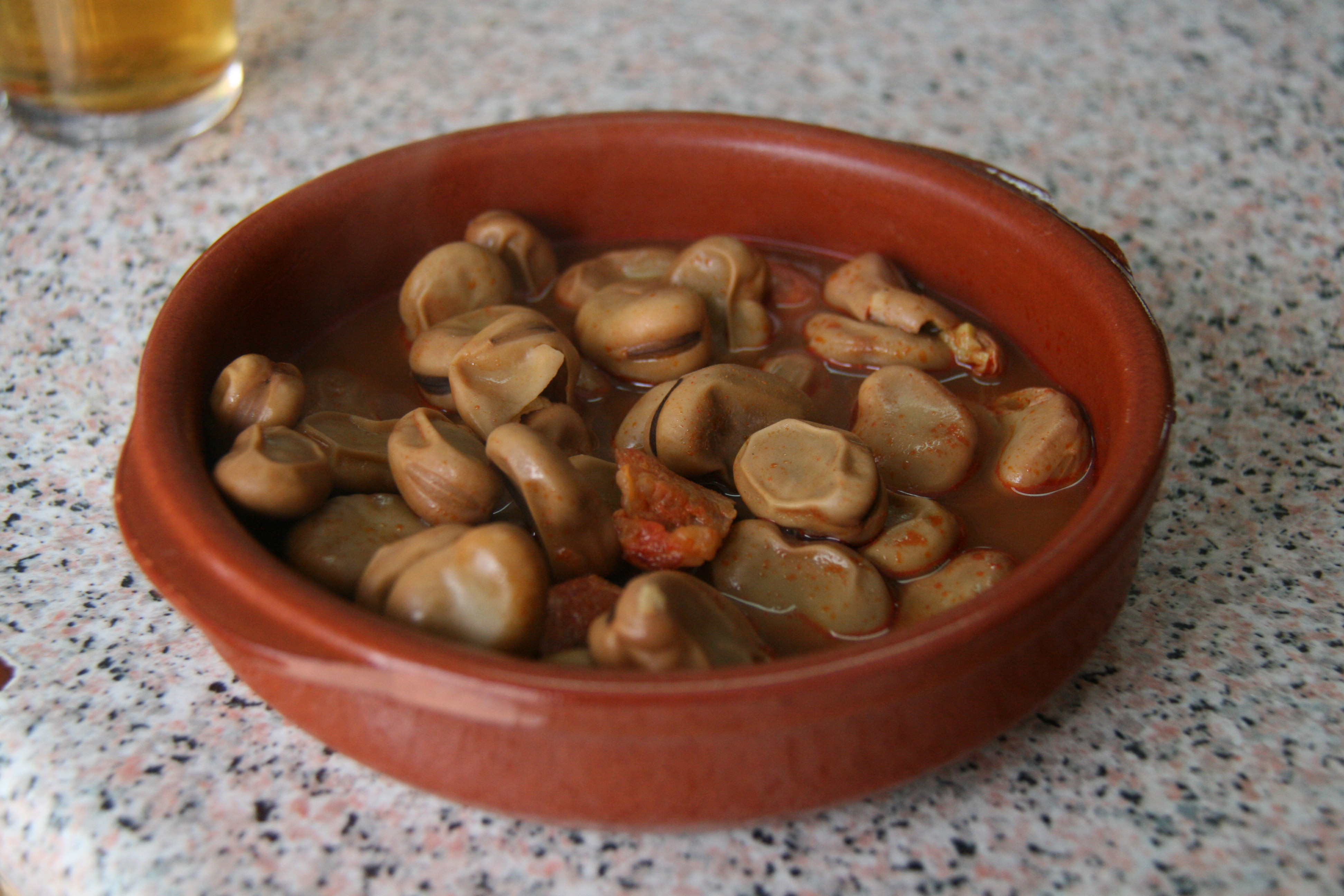 Michirones - Habas estofadas con chorizo